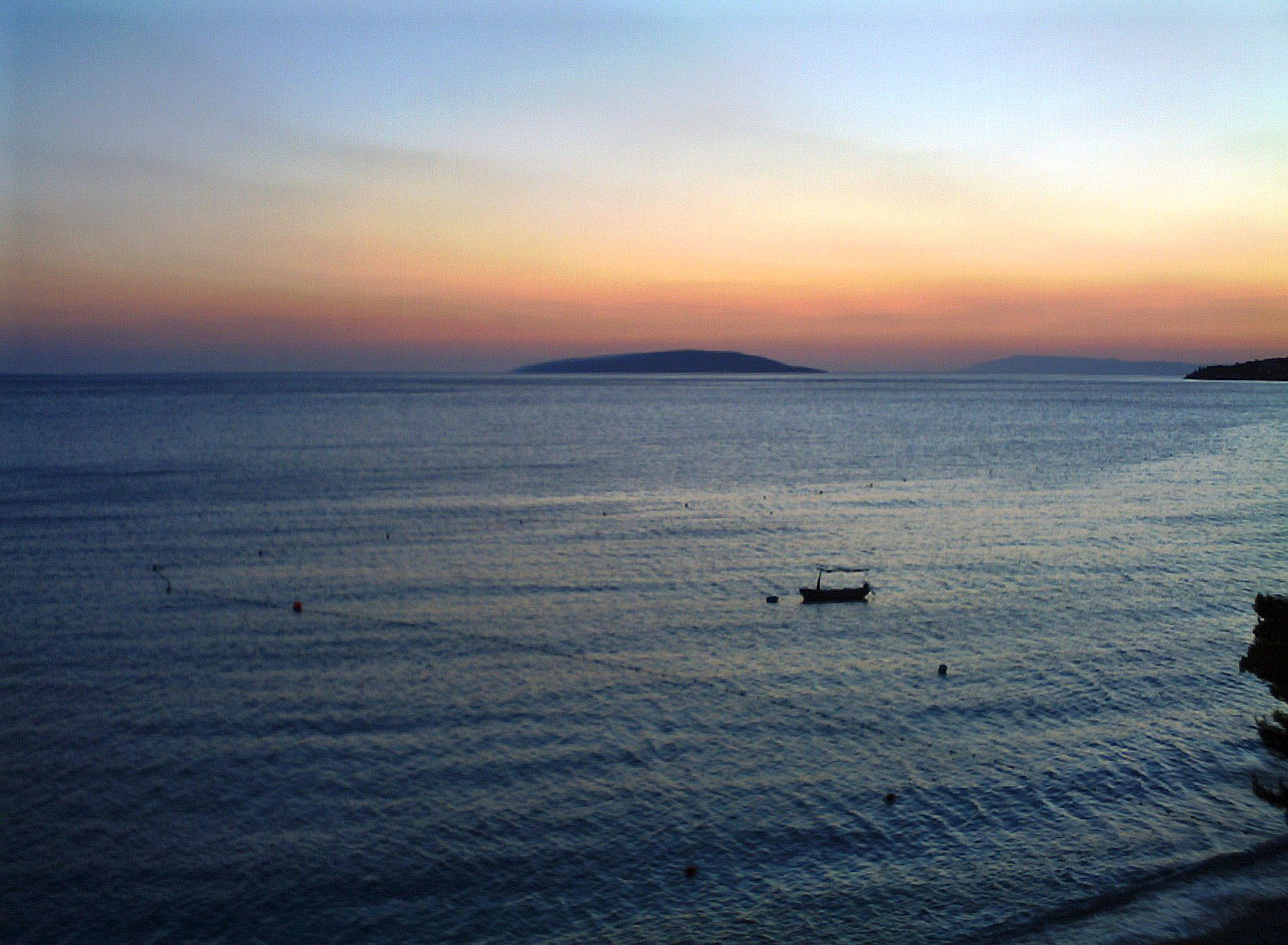 Die Inseln Hvar und Brac sind an klaren Tagen gut zu erkennen. Man kann in Gradac herrliche Sonnenuntergänge erleben.